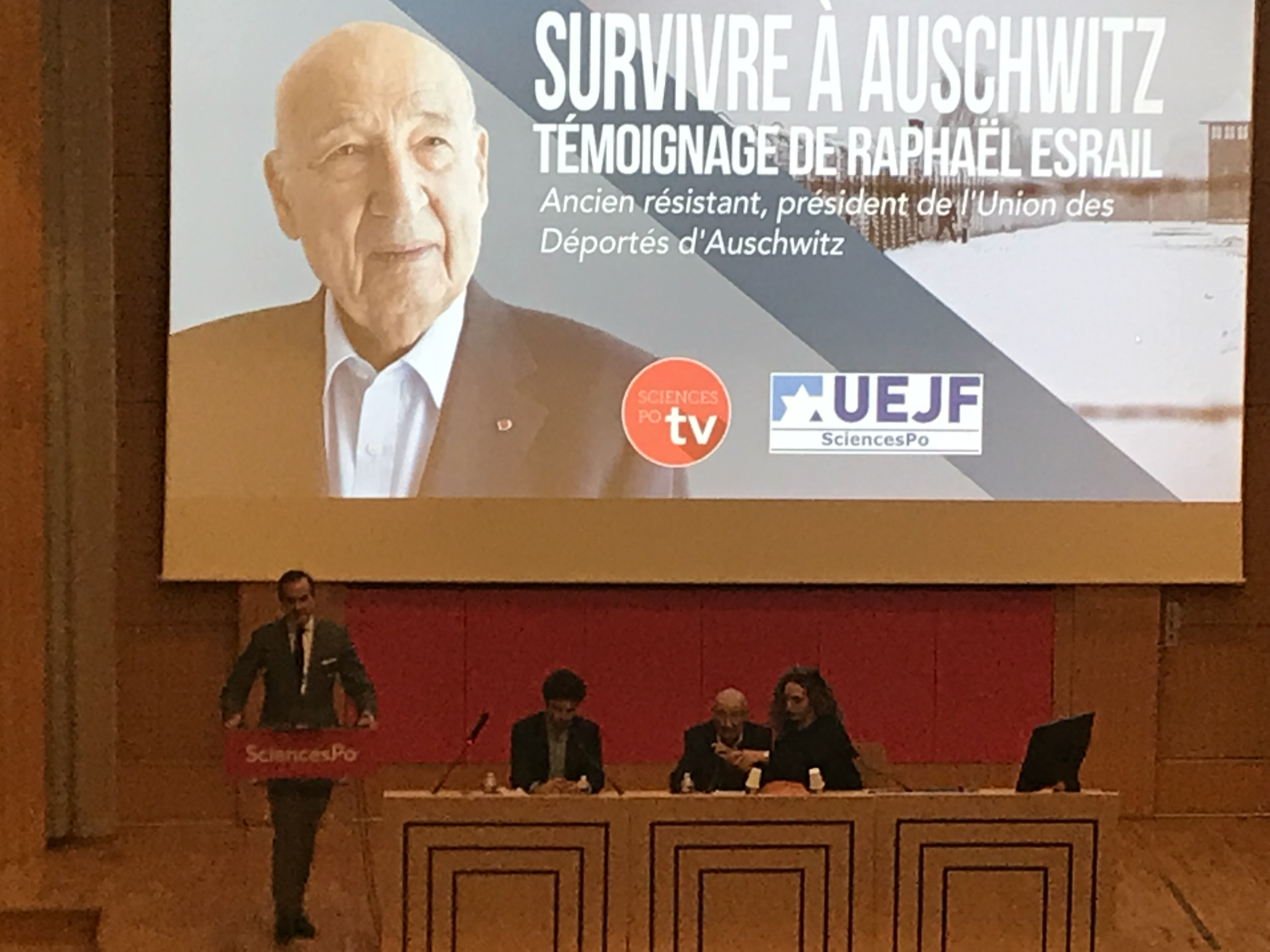 Amphithéâtre Émile Boutmy Sciences Po lors d'une conférence de Raphaël Esrail, 13 février 2018.